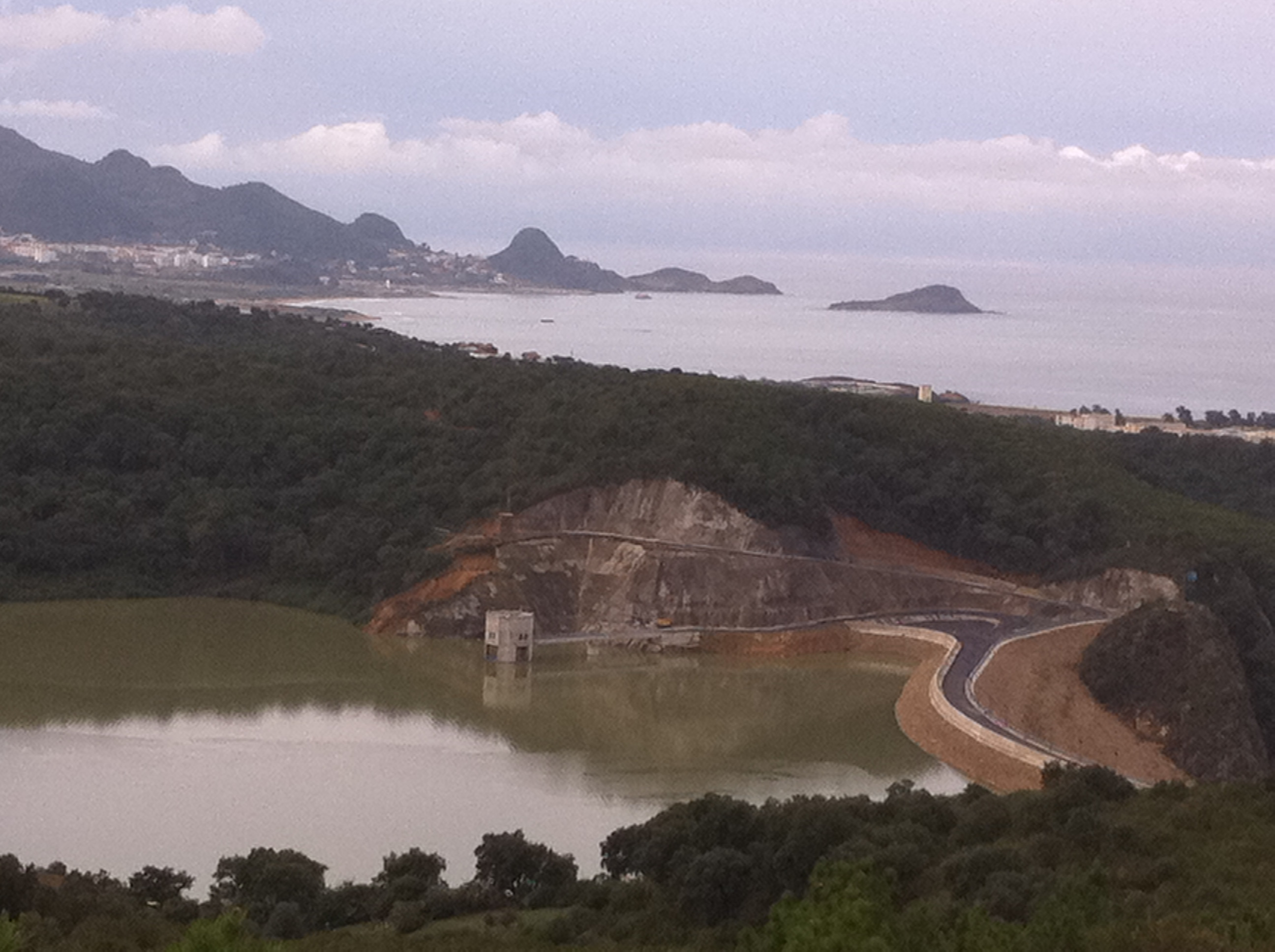 barrage de KESSIR 2